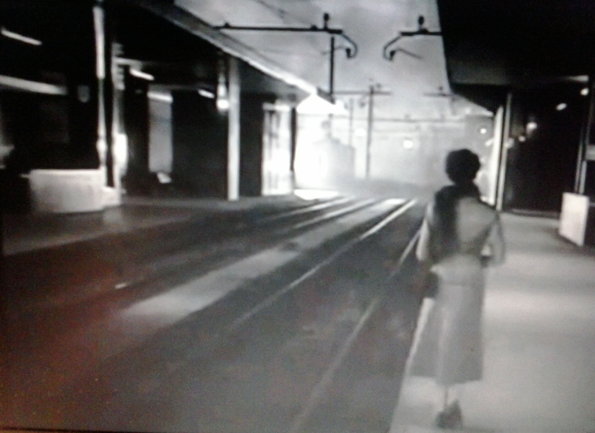 JenniferJones in "Stazione Termini"(De Sica-1953)